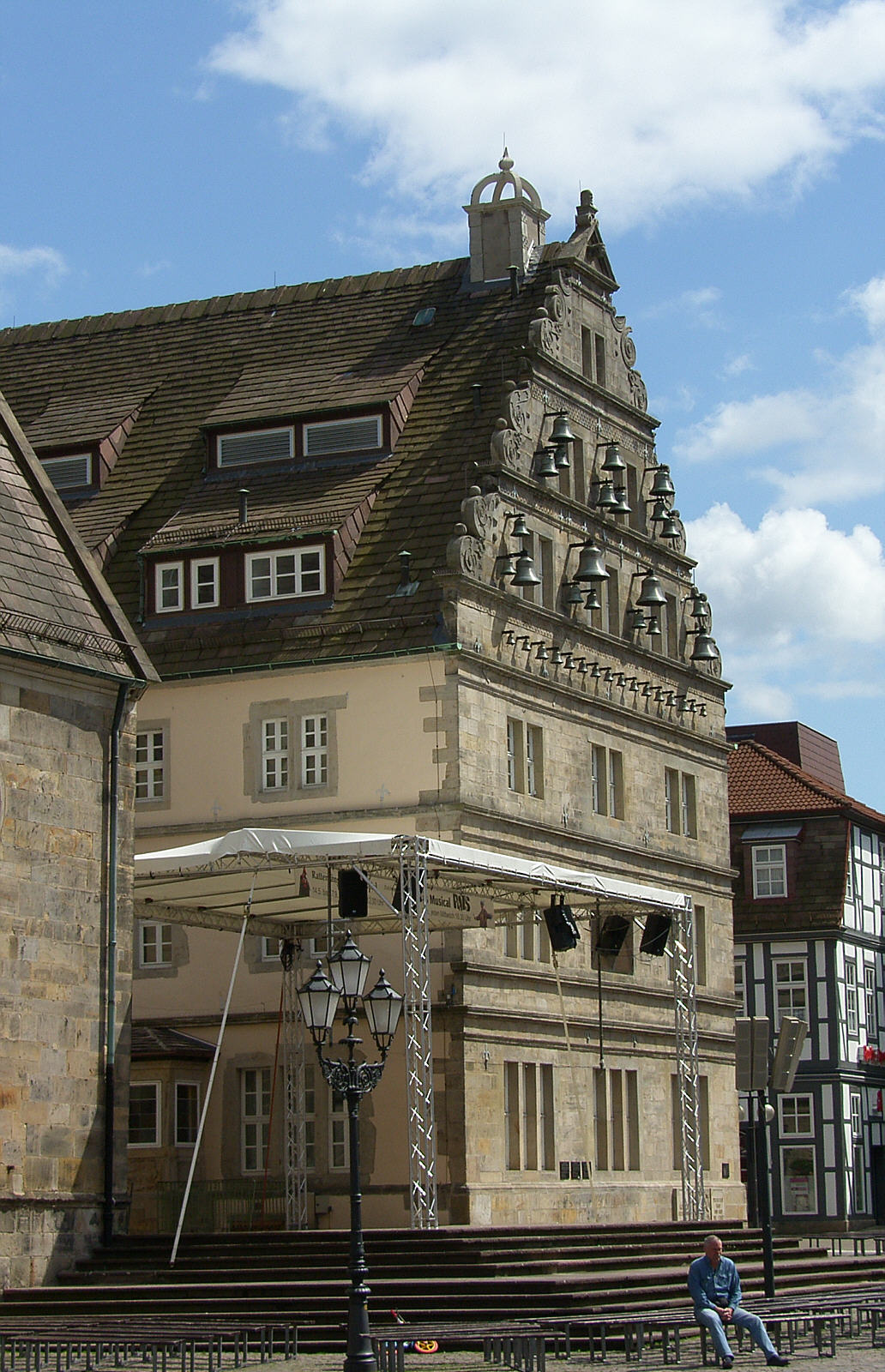 Hochzeitshaus am Markt mit Glockenspiel